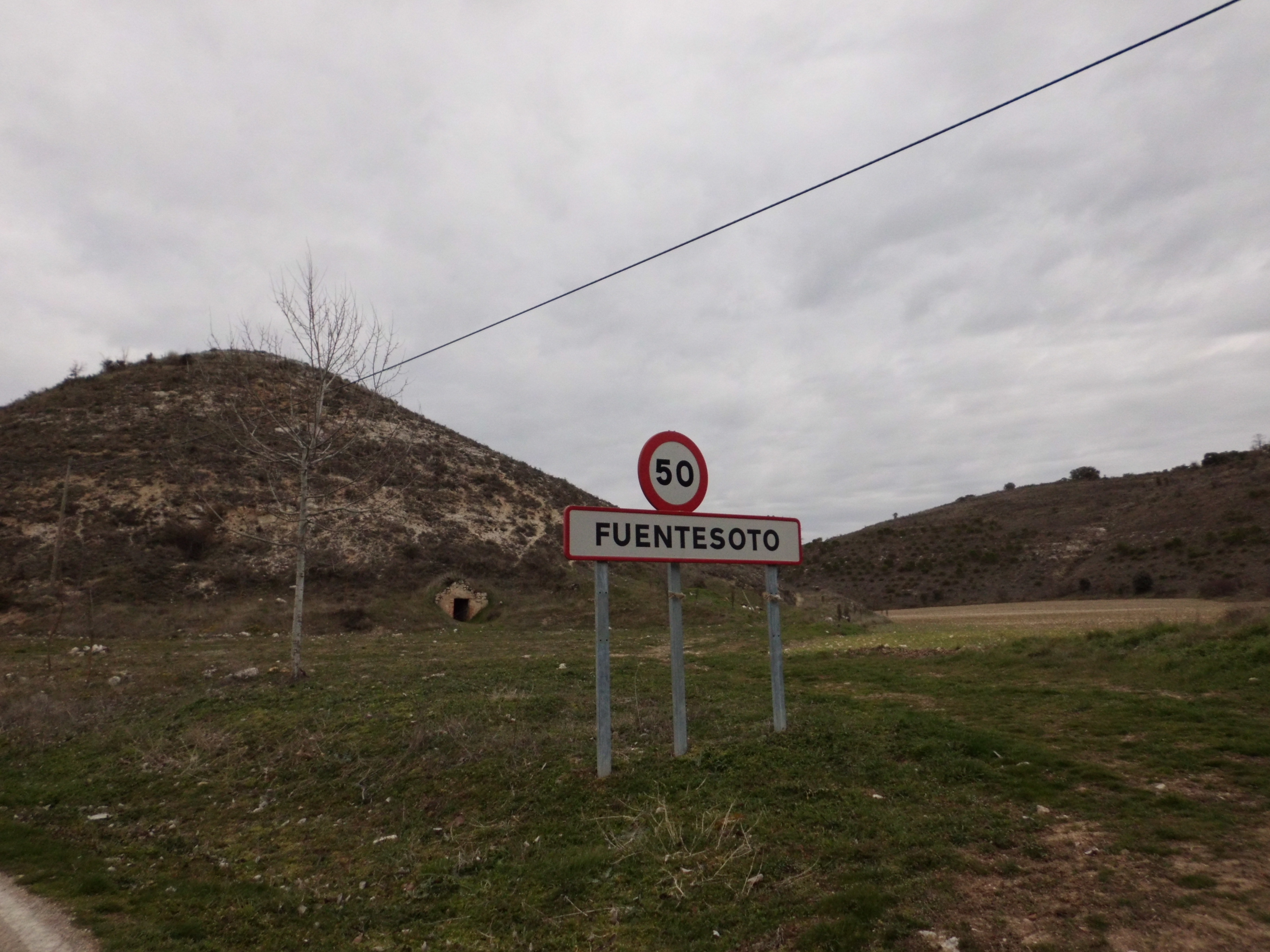 Cartel de Obras Públicas anunciando la localidad segoviana de Fuentesoto, España.